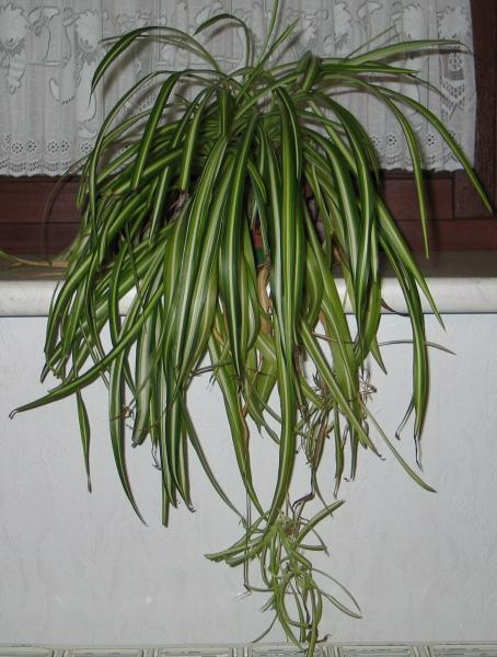 Grünlilie mit Ablegern